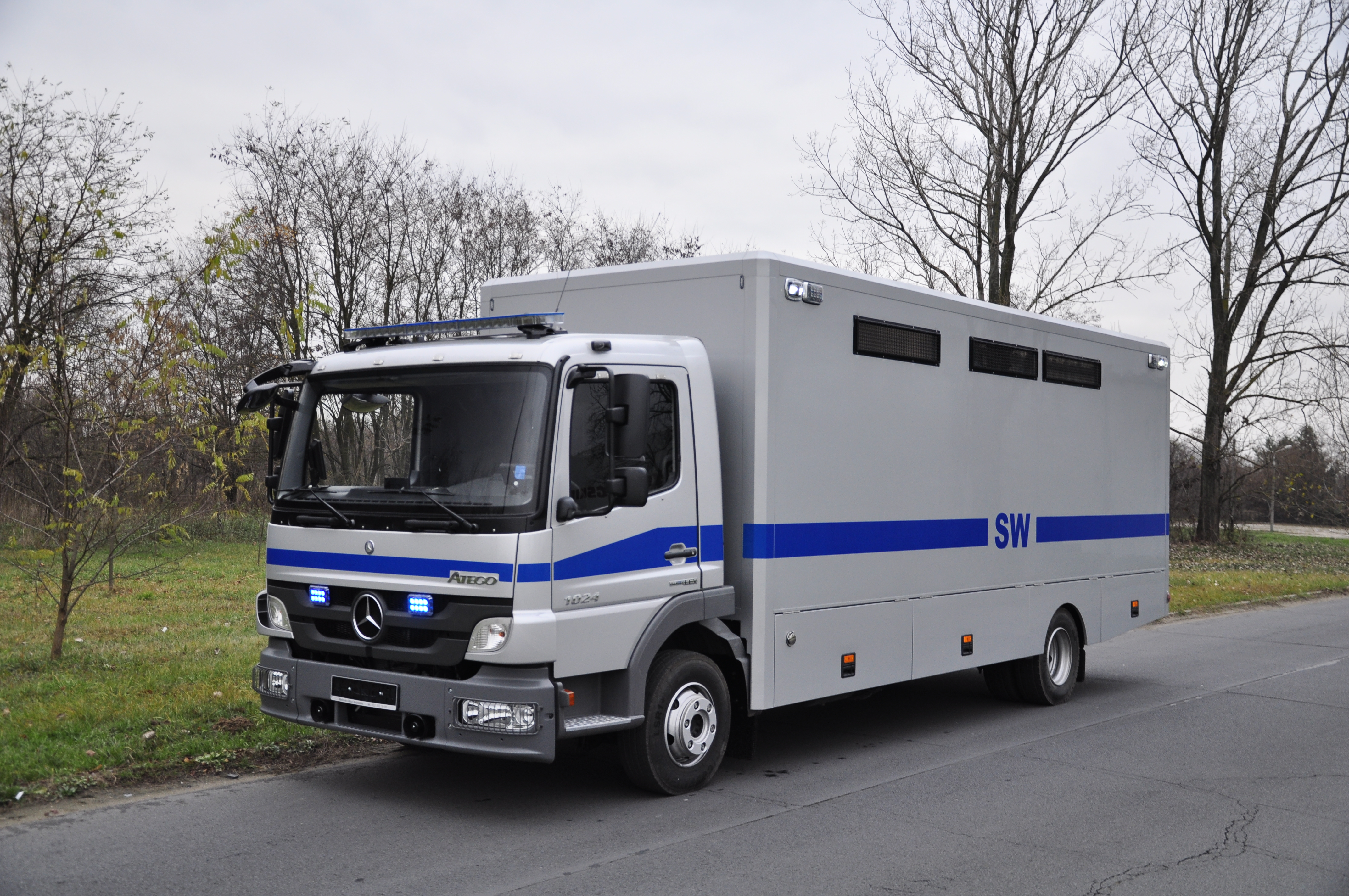 Pojazd Służby Więziennej na bazie Mercedesa Atego przygotowany przez AMZ Kutno